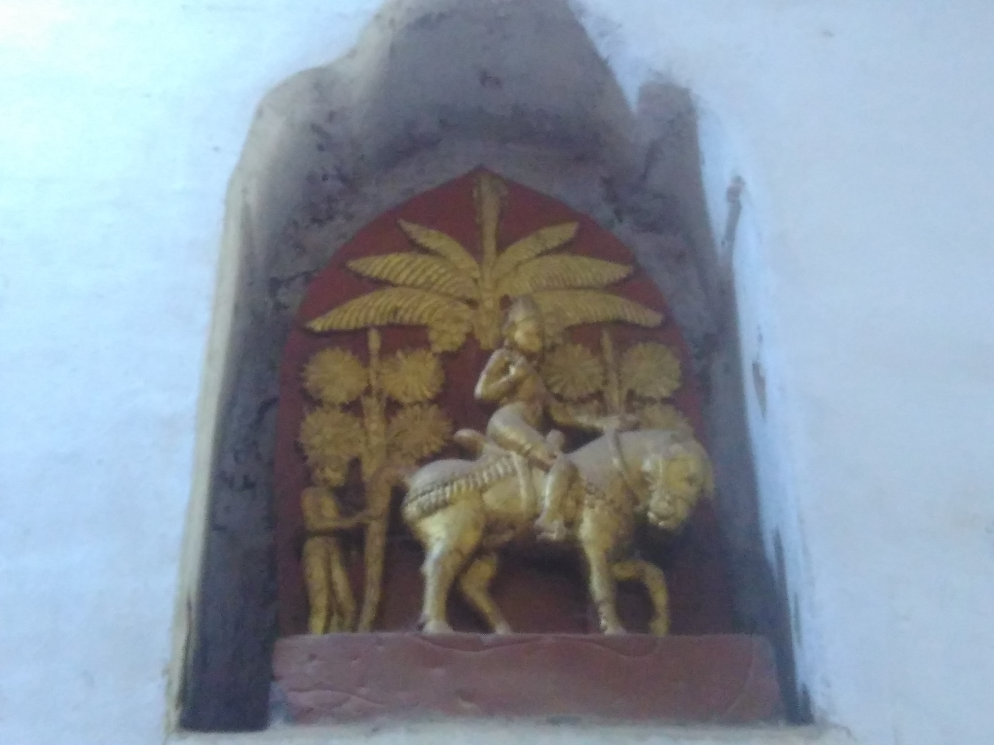 အာနန္ဒာဘုရားရှိ သိဒ္ဓတ္ထမင်းသား တောထွက်နေပုံရုပ်ထု